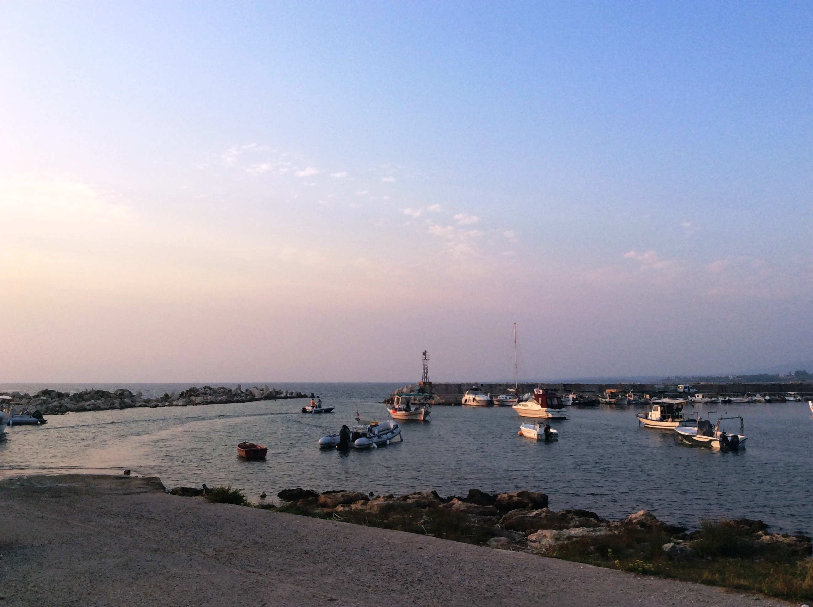 Μαραθόπολη. Το λιμάνι της Μαραθόπολης.